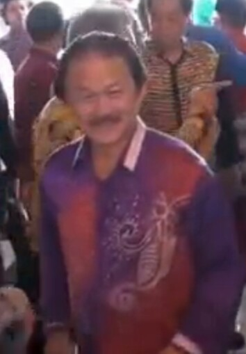 Majlis Rumah Terbuka Hari Raya Aidilfitri YAB Ketua Menteri dan Jemaah Menteri Negeri Sabah [ Hari Raya Ketiga bersamaan 3 Syawal 1439H ] Tempat ; Plaza Sunset pekarangan Menara Tun Mustapha Kota Kinabalu Masa ;jam 10.00 pagi hingga 1.00 petang.